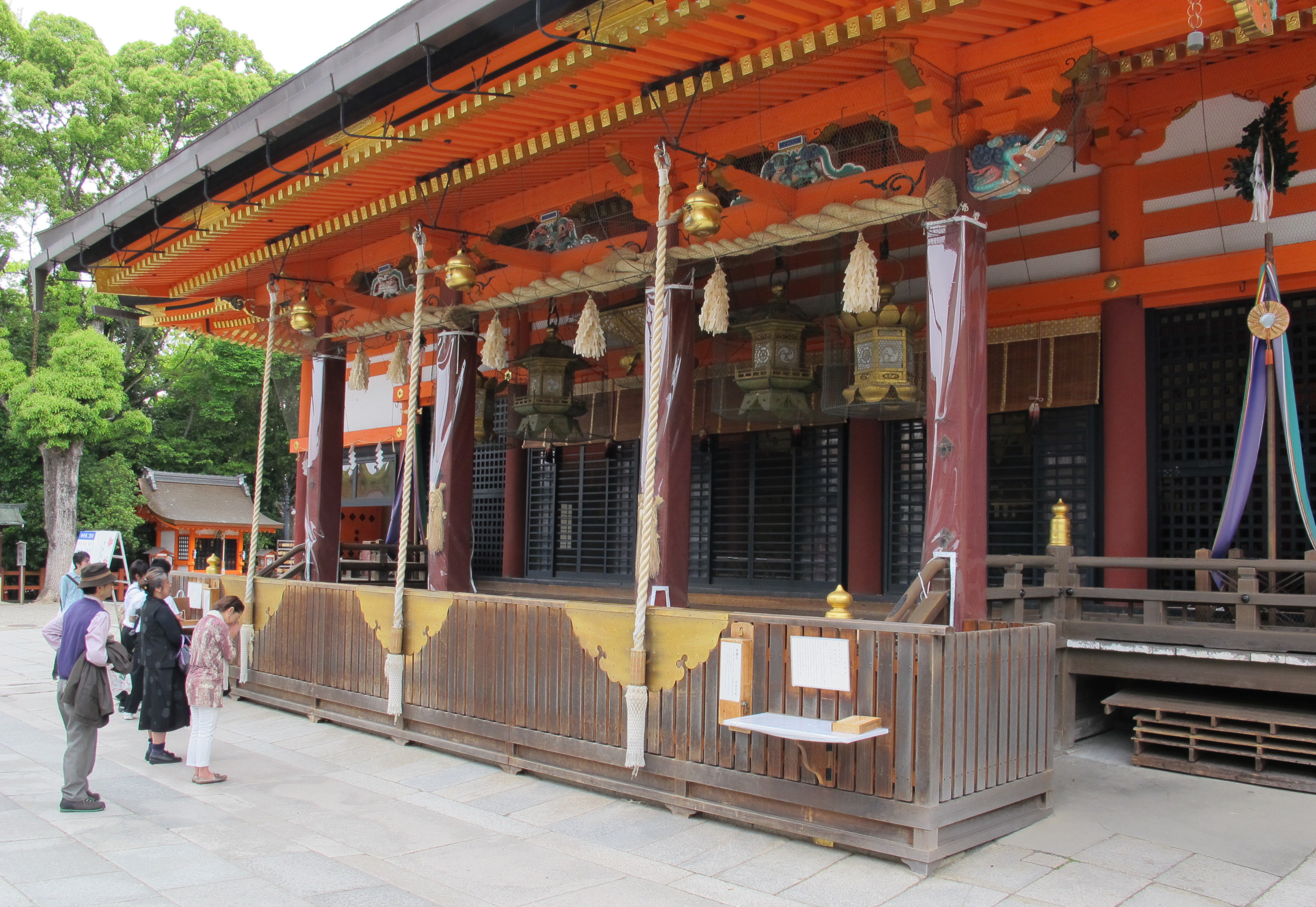 Santuario yasaka